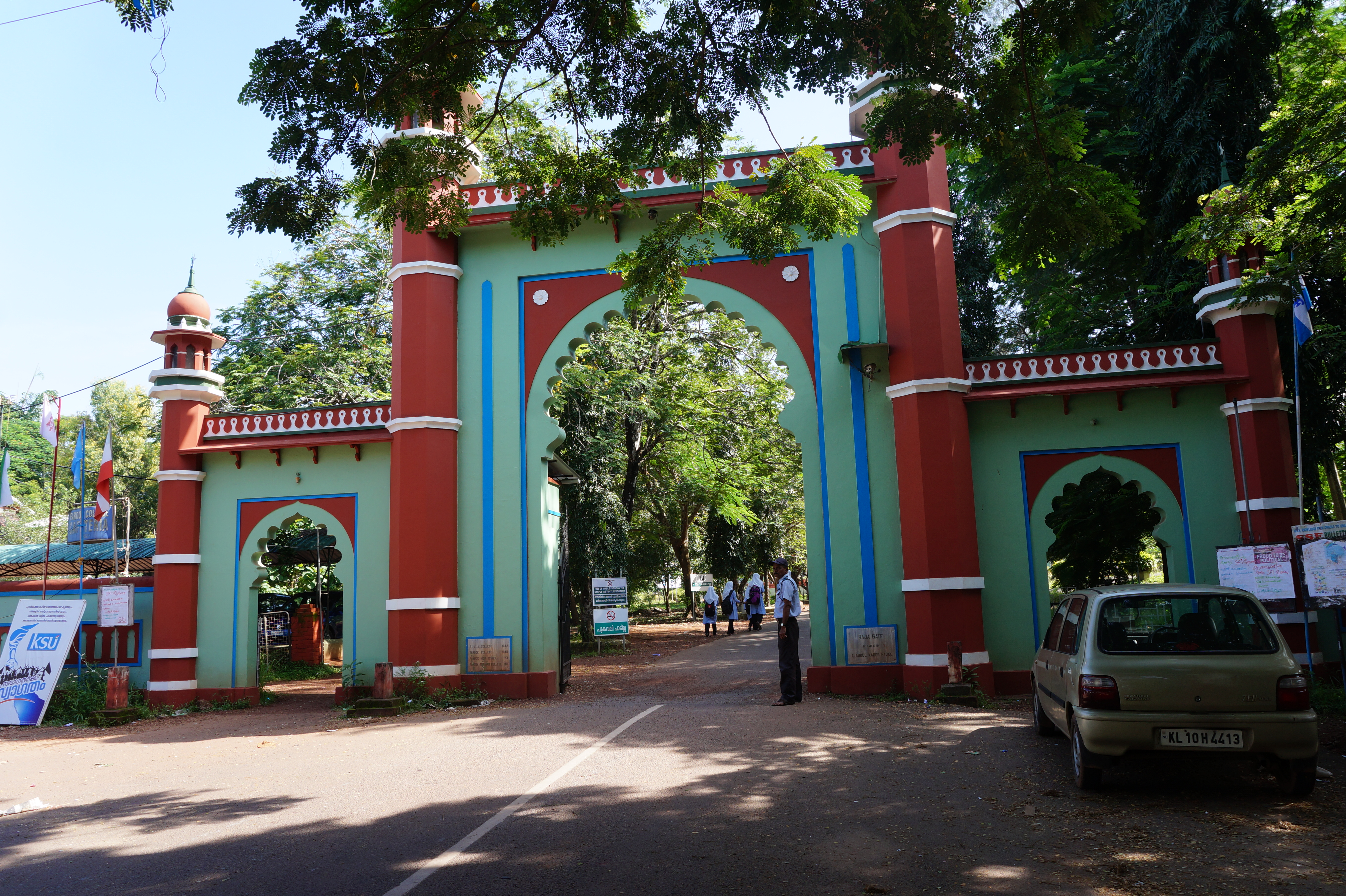 ഫാറൂക്ക് കോളേജ് പ്രധാന കവാടം